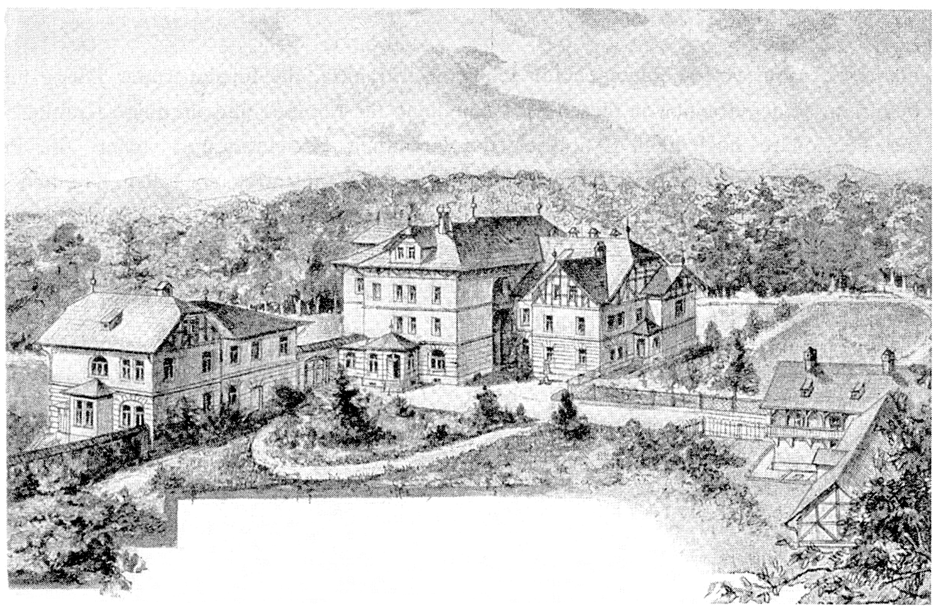 Postkarte aus dem Jahr 1900 der Kuranstalt Obersendling für Psychisch-Kranke von Herrn Geheimrat Dr. Karl Ranke heute Krankenhaus Martha-Maria, München